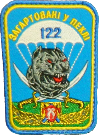 Нарукавний знак, 122-й окремий аеромобільний батальйон